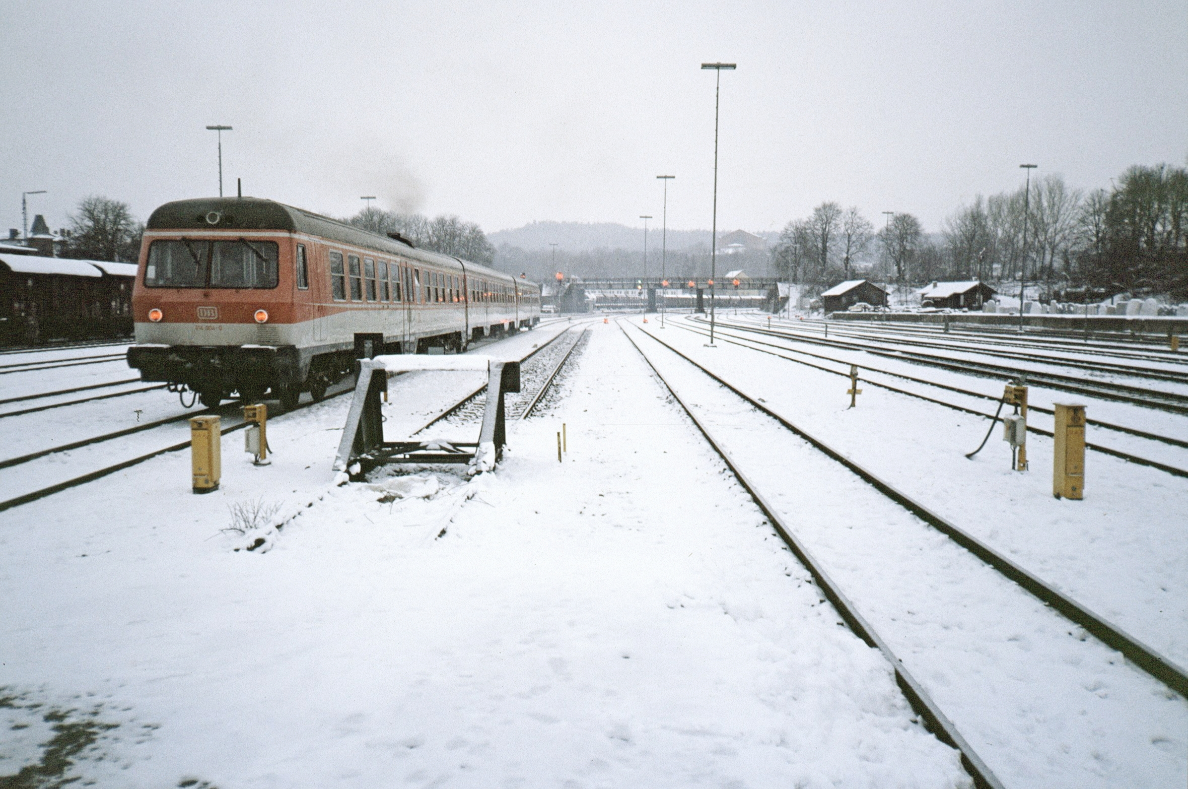 Bayreuth Hauptbahnhof mit 614 (Scan von Dia)